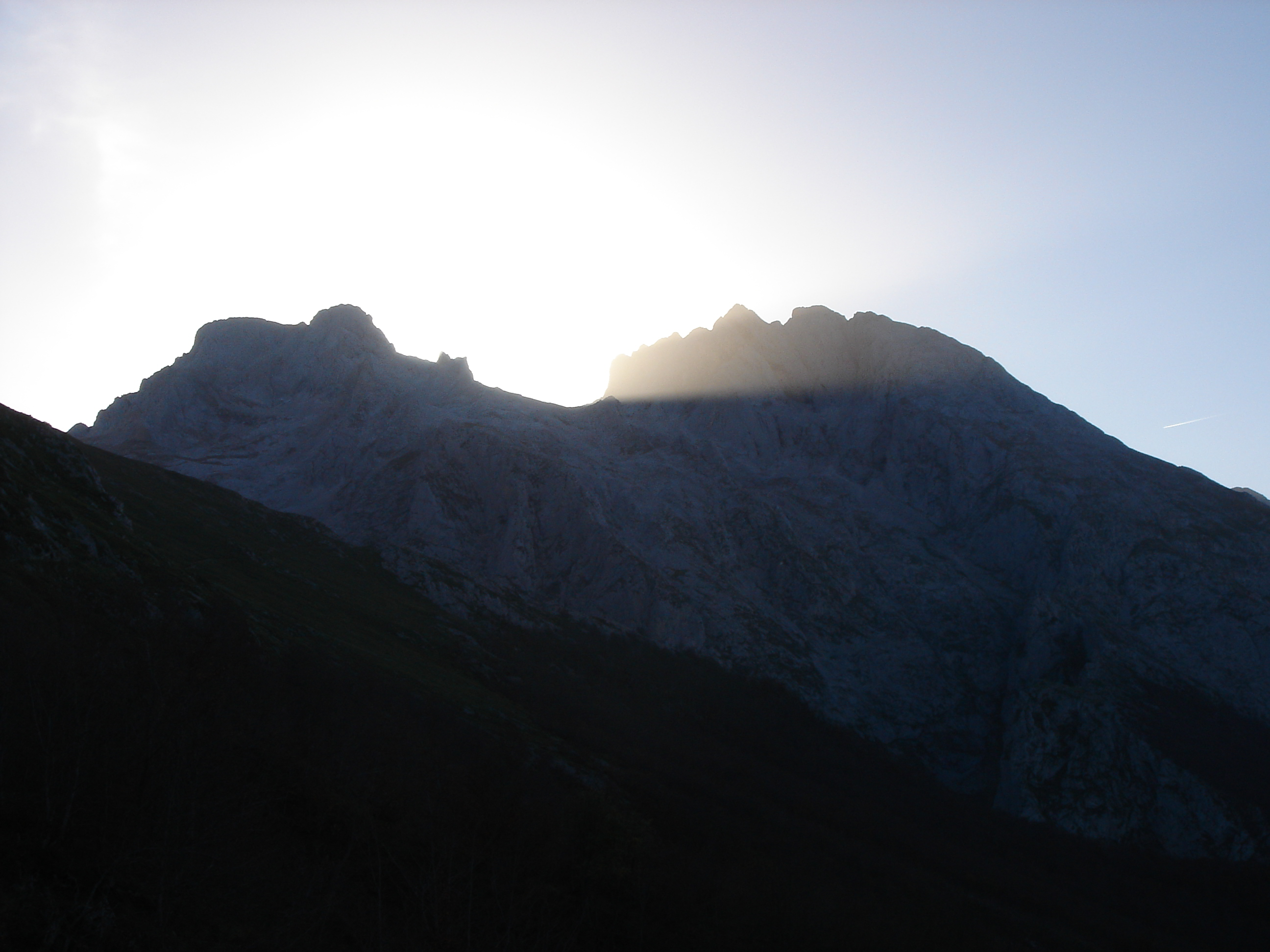 Picos de Europa, Asturias, Spain.